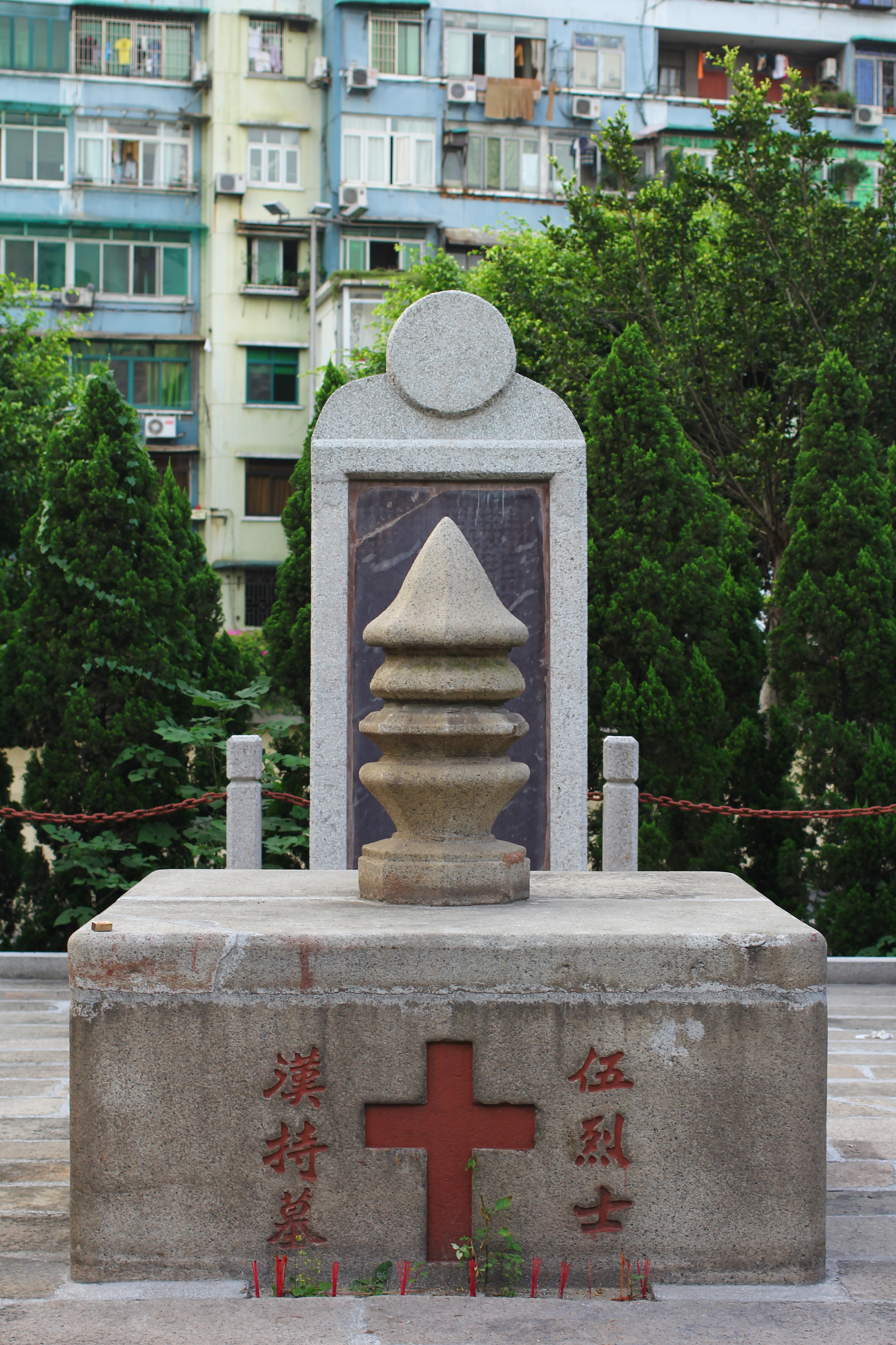 伍烈士漢持墓。其生前為基督徒。位於廣州市中山大學腫瘤防治中心（附屬腫瘤醫院）西側。